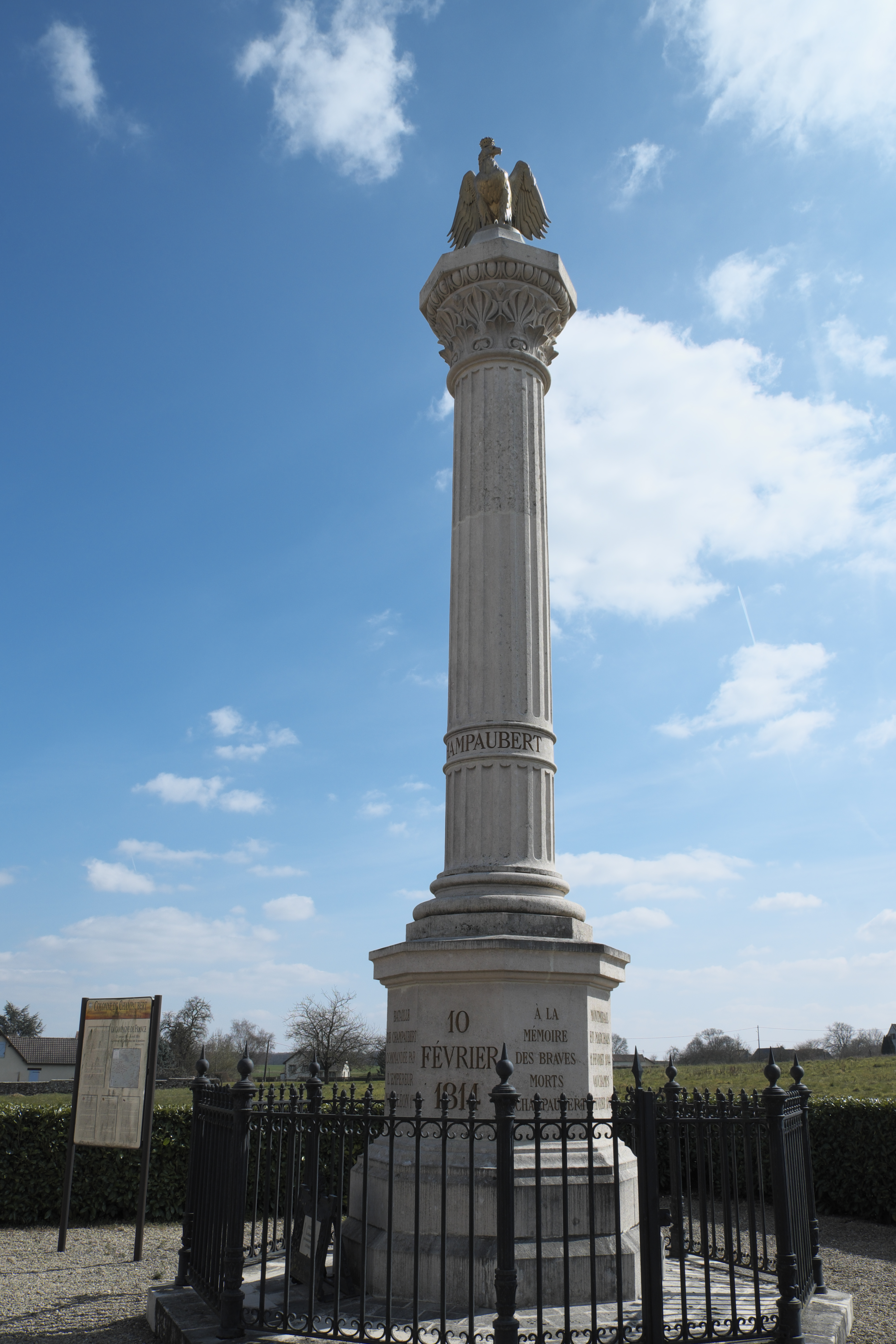 Gedenksäule für die Schlacht bei Champaubert in Champaubert im Département Marne (Region Alsace-Champagne-Ardenne-Lorraine/Frankreich)